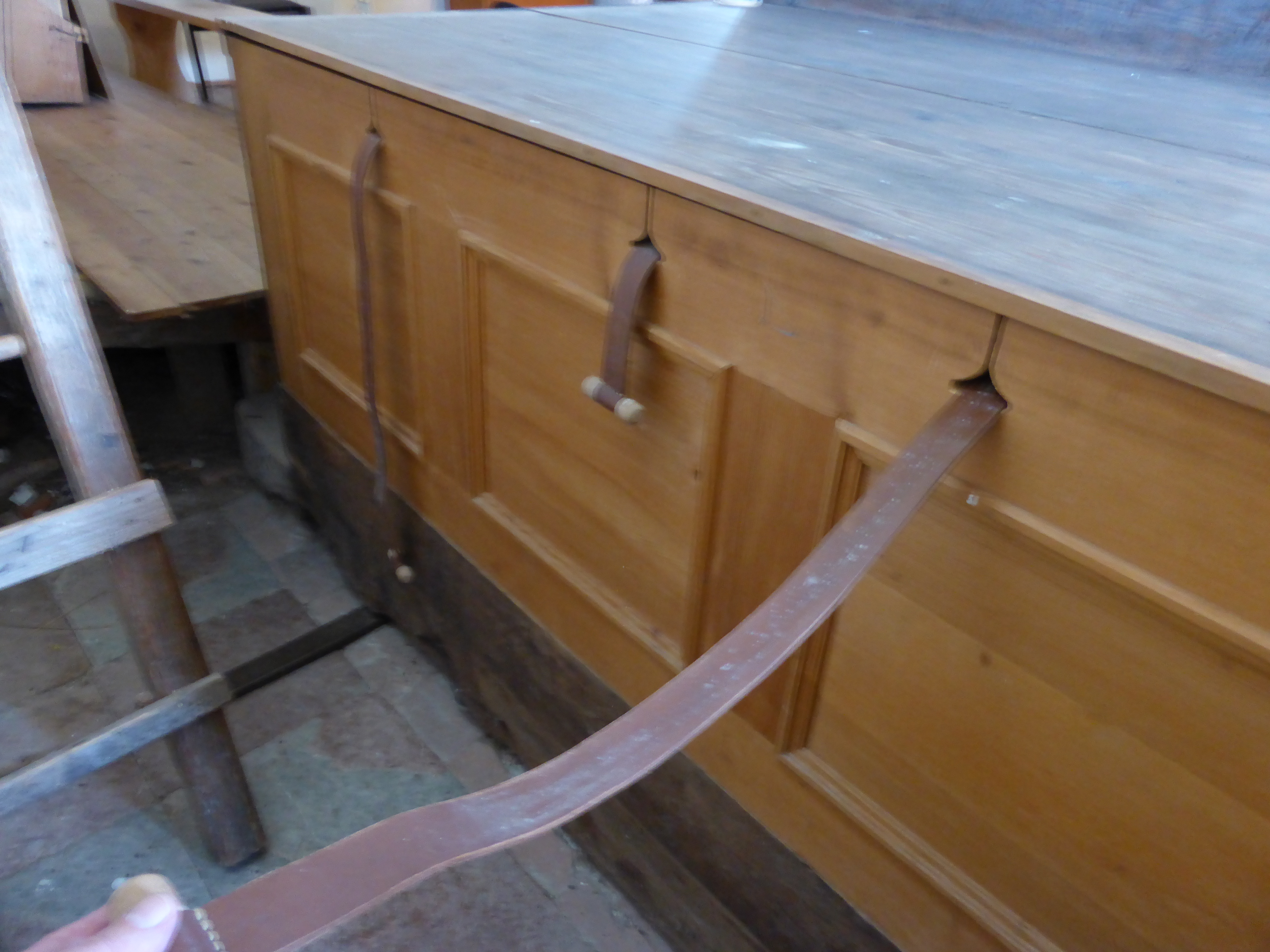 "Melkanlage" der Egedacher-Orgel mit drei Keilbälgen